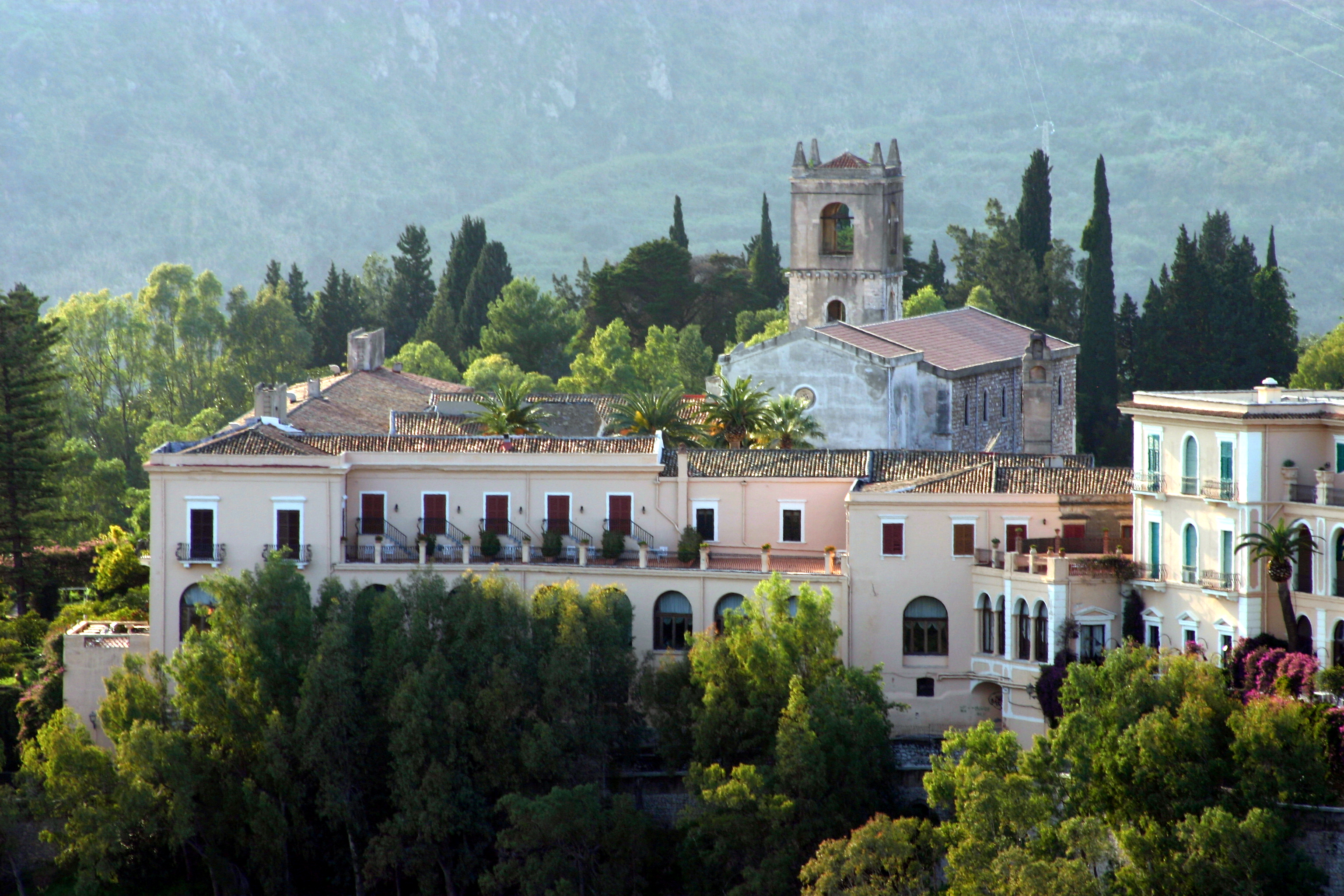 Vistas a partir do Teatro de Taormina